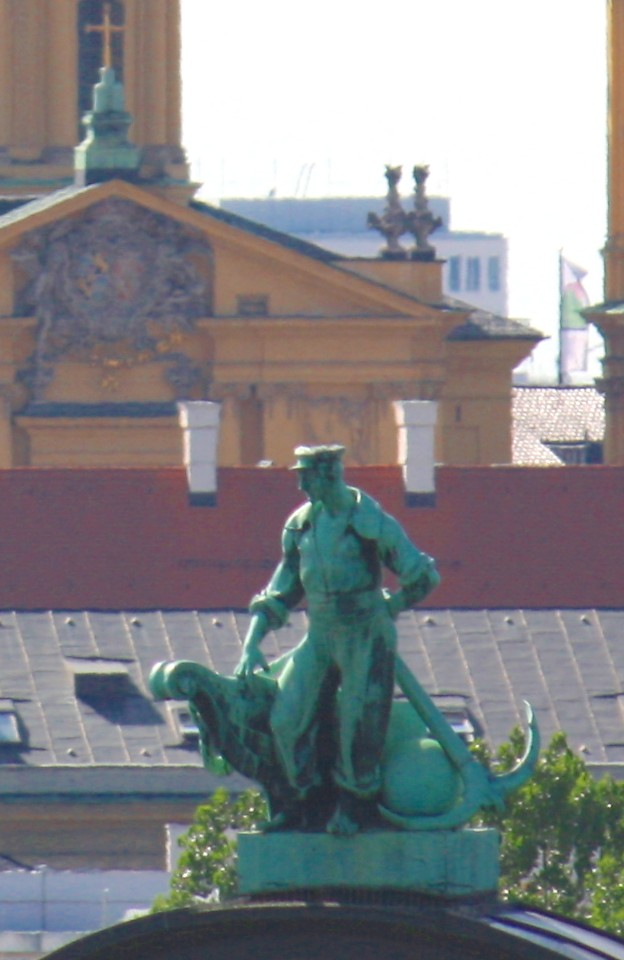 Statue auf einem Dach in München, Blick vom Landtag aus.